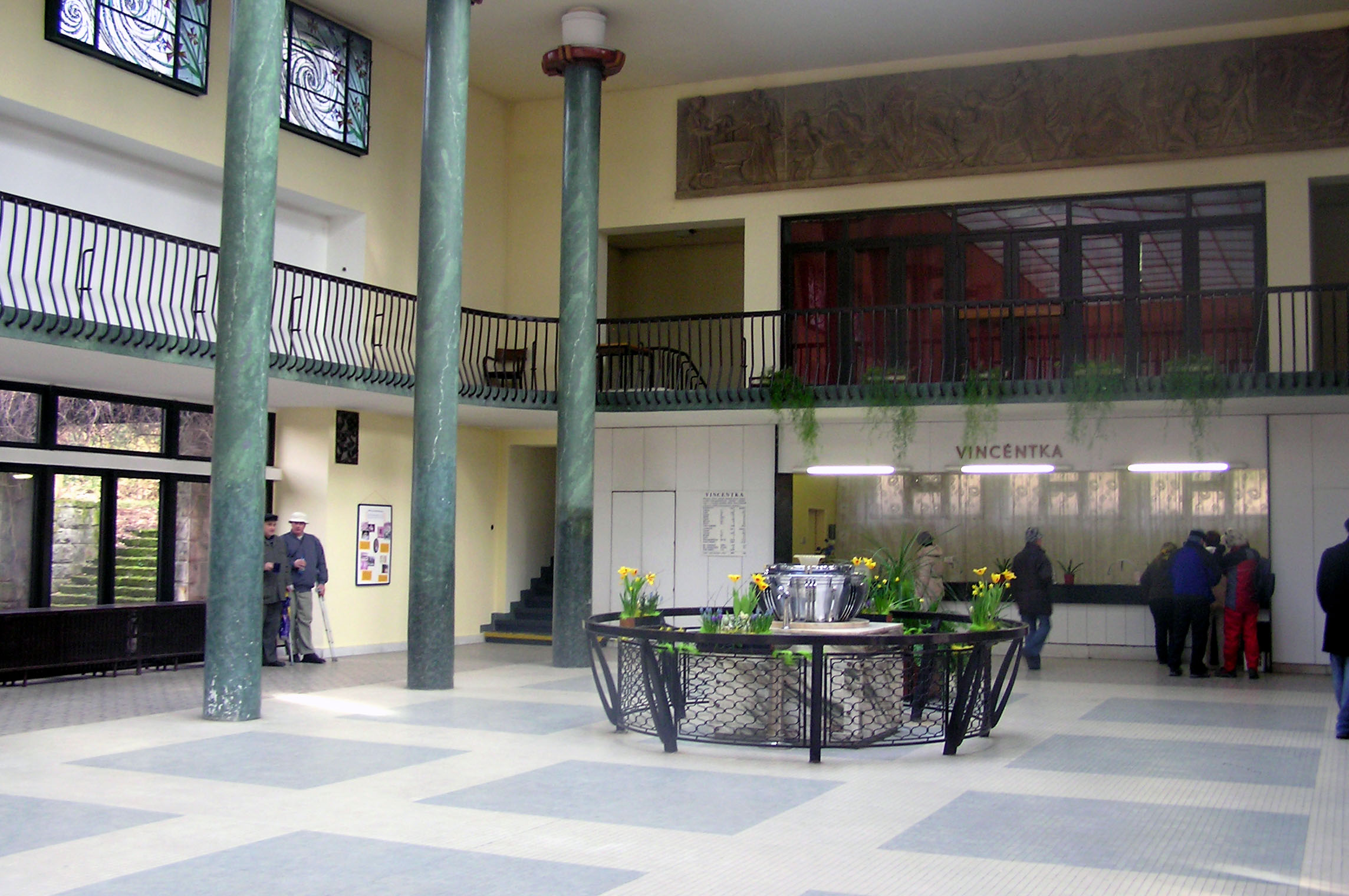 Luhačovice - interier haly pramene Vincentka